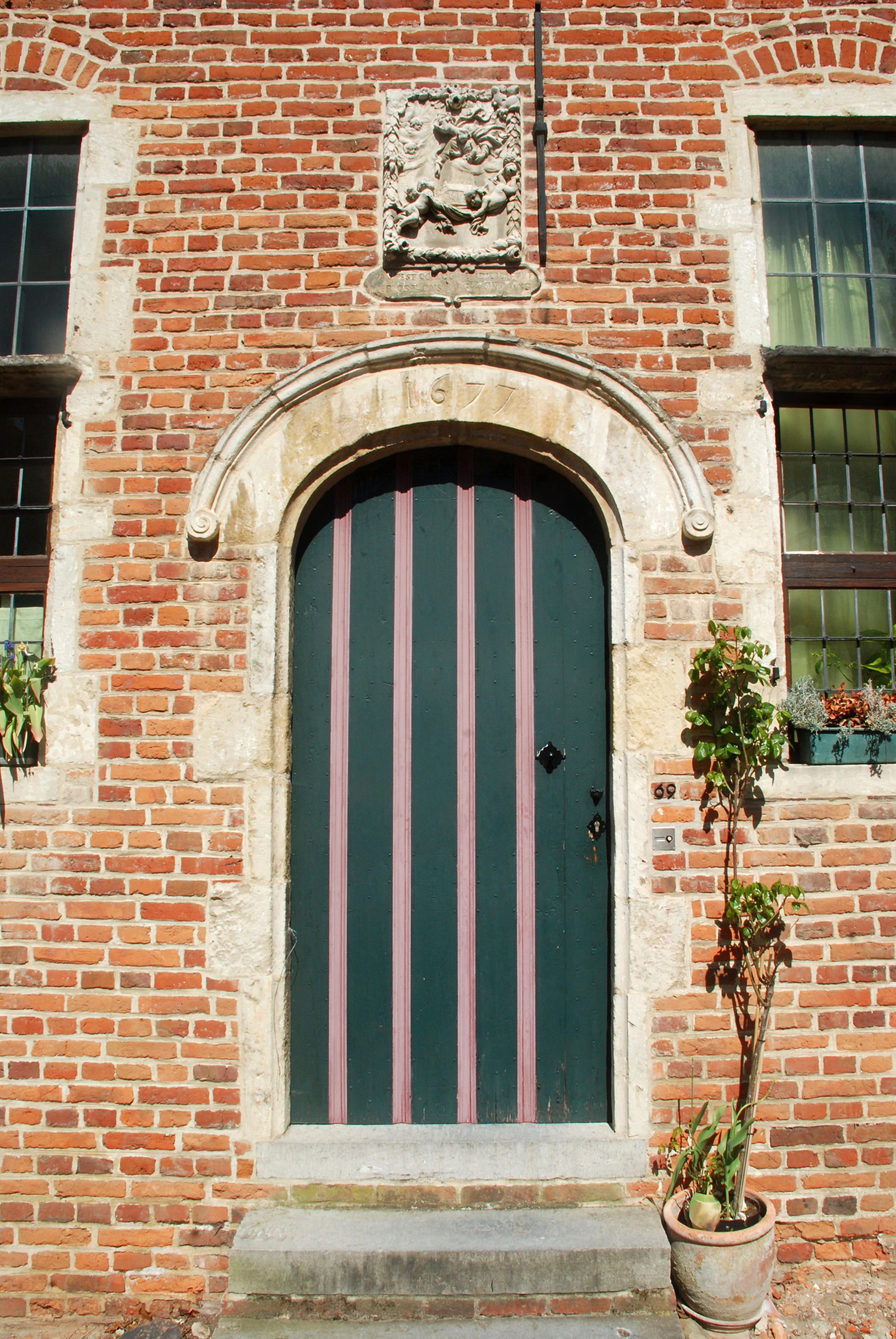 Belgium - Leuven - Groot Begijnhof - Klein Straatken n°69